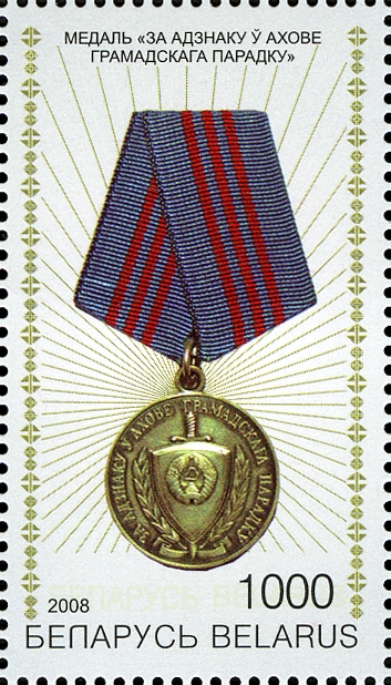 № 753. Медаль “За отличие в охране общественного порядка""